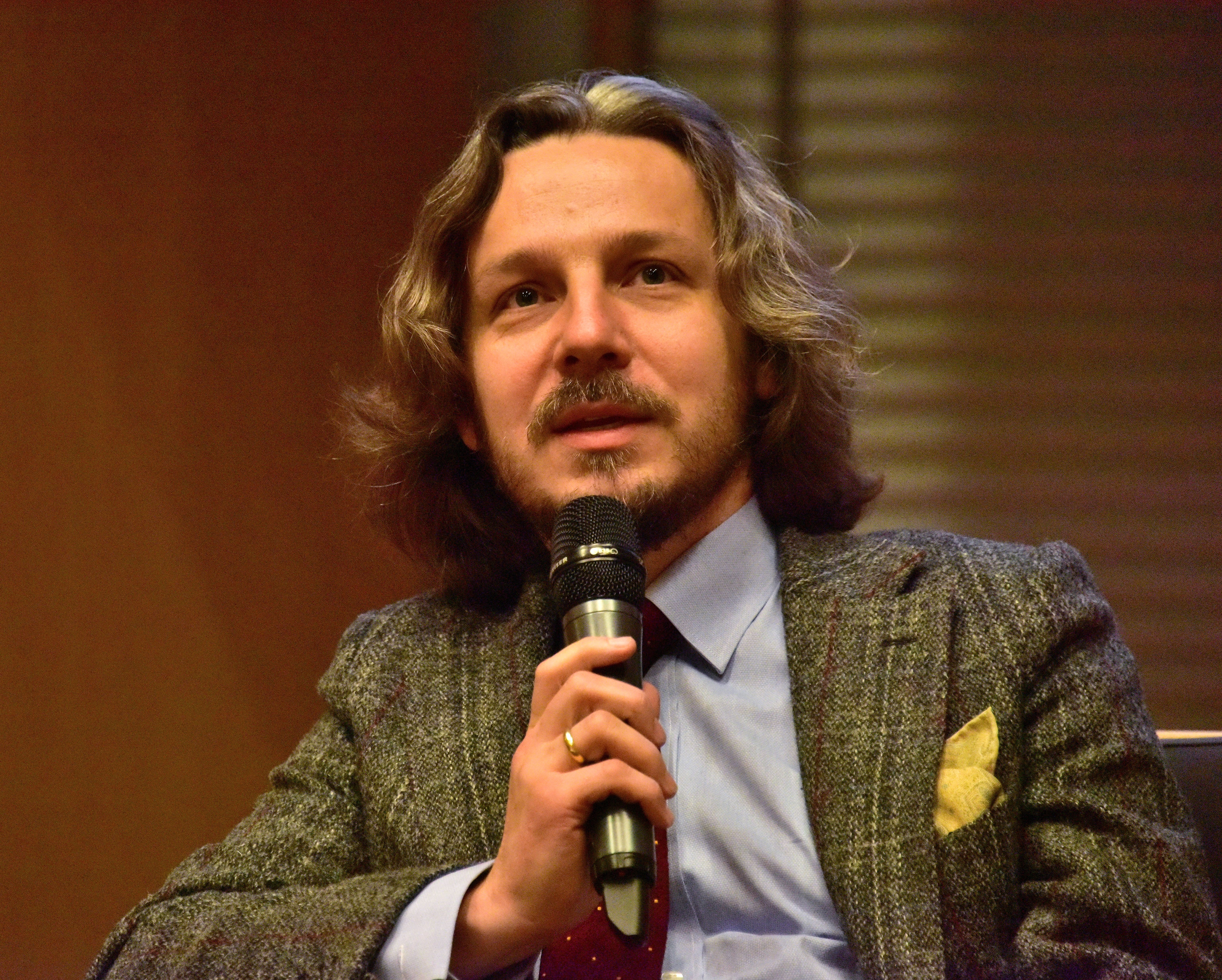 Wit Szostak, pisarz i pracownik naukowy UEK